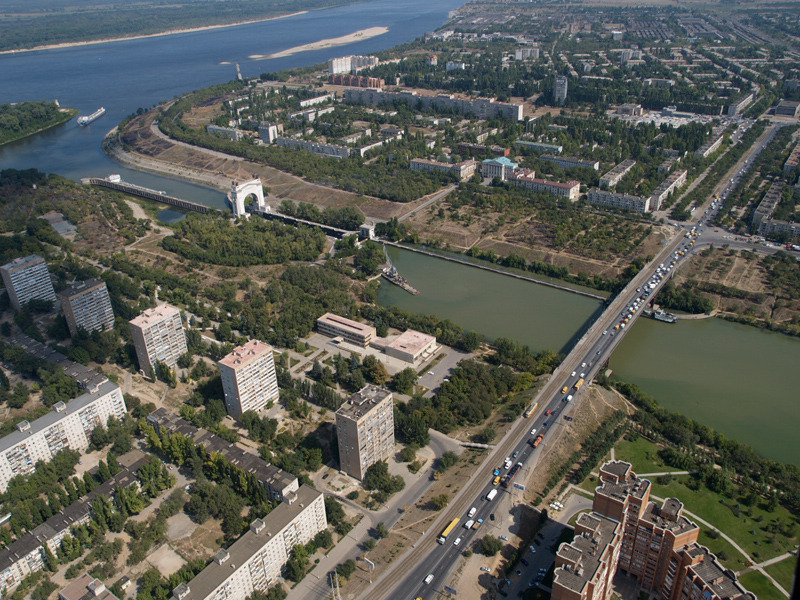 Вид на заканальную часть Красноармейского района Волгограда из вертолёта. Виден Волго-Донской канал, первый шлюз с аркой, памятник Ленину.